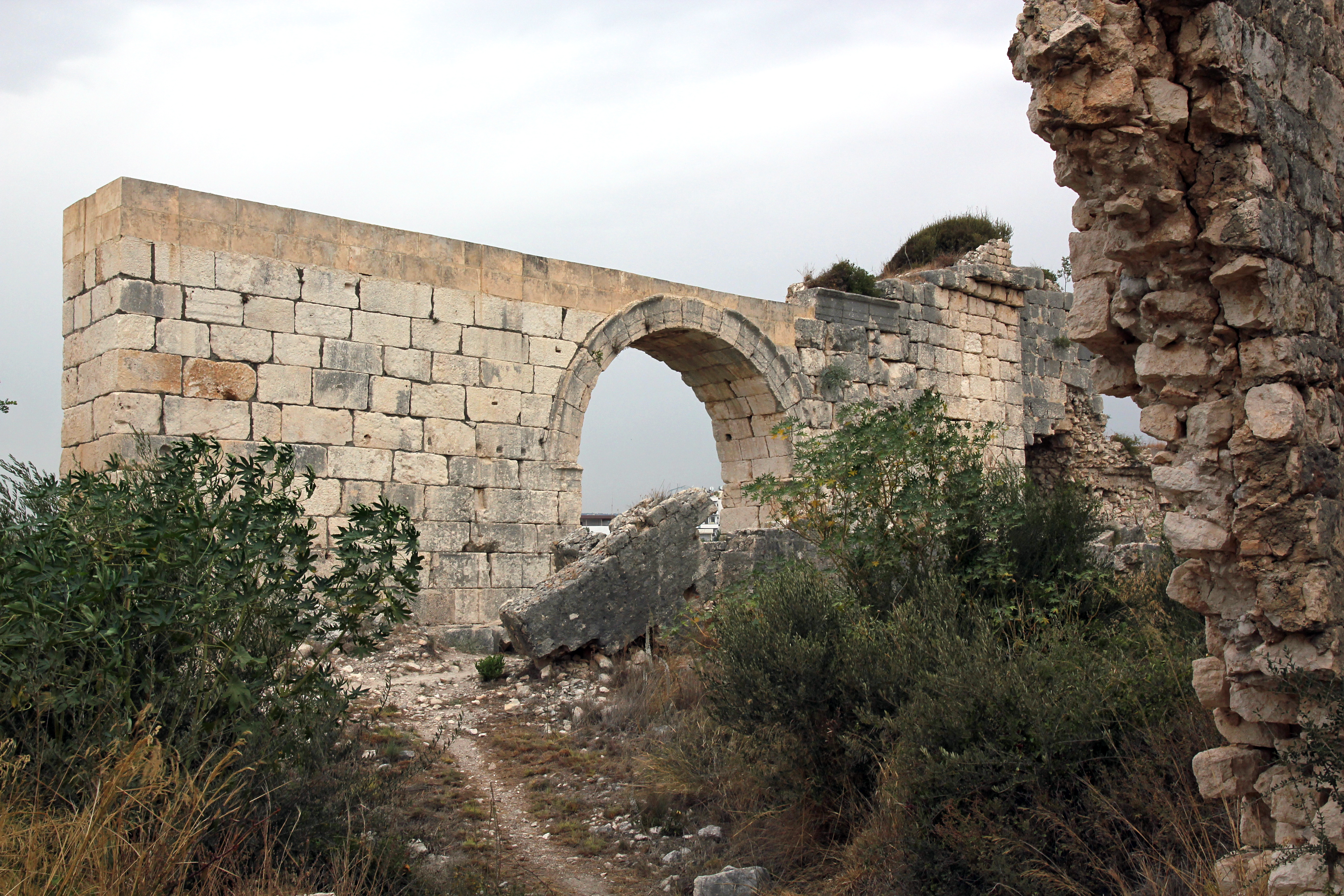 Korykos, römisches Prunktor der Landburg bei Kızkalesi, Südtürkei, Ansicht von Osten